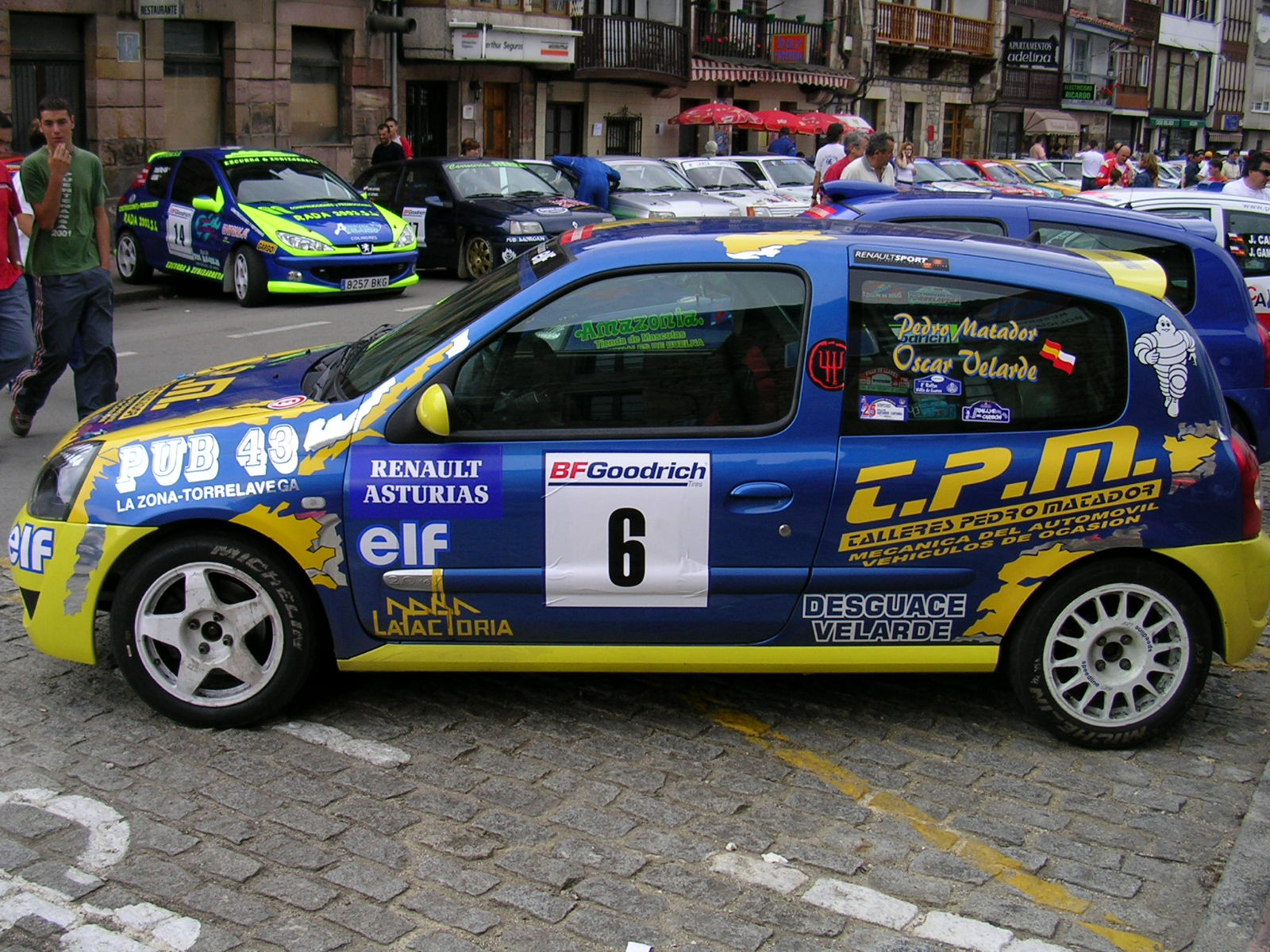 Pedro Matador y Oscar Velarde en el Rallye Villa de Cabezón de la Sal. Era puntuable con COEFICIENTE 7 para los siguientes Campeonatos y Trofeos: Campeonato Absoluto de Cantabria. Campeonato de Cantabria de Rallies. (Pilotos y Copilotos). Campeonato de Cantabria de Escuderias. Trofeo Regional "Jesús Saiz". Trofeo Regional “Jesús Saiz” Junior. Trofeo de Cantabria Grupo “N”. Trofeo de Cantabria de Clásicos. (Pilotos y Copilotos).